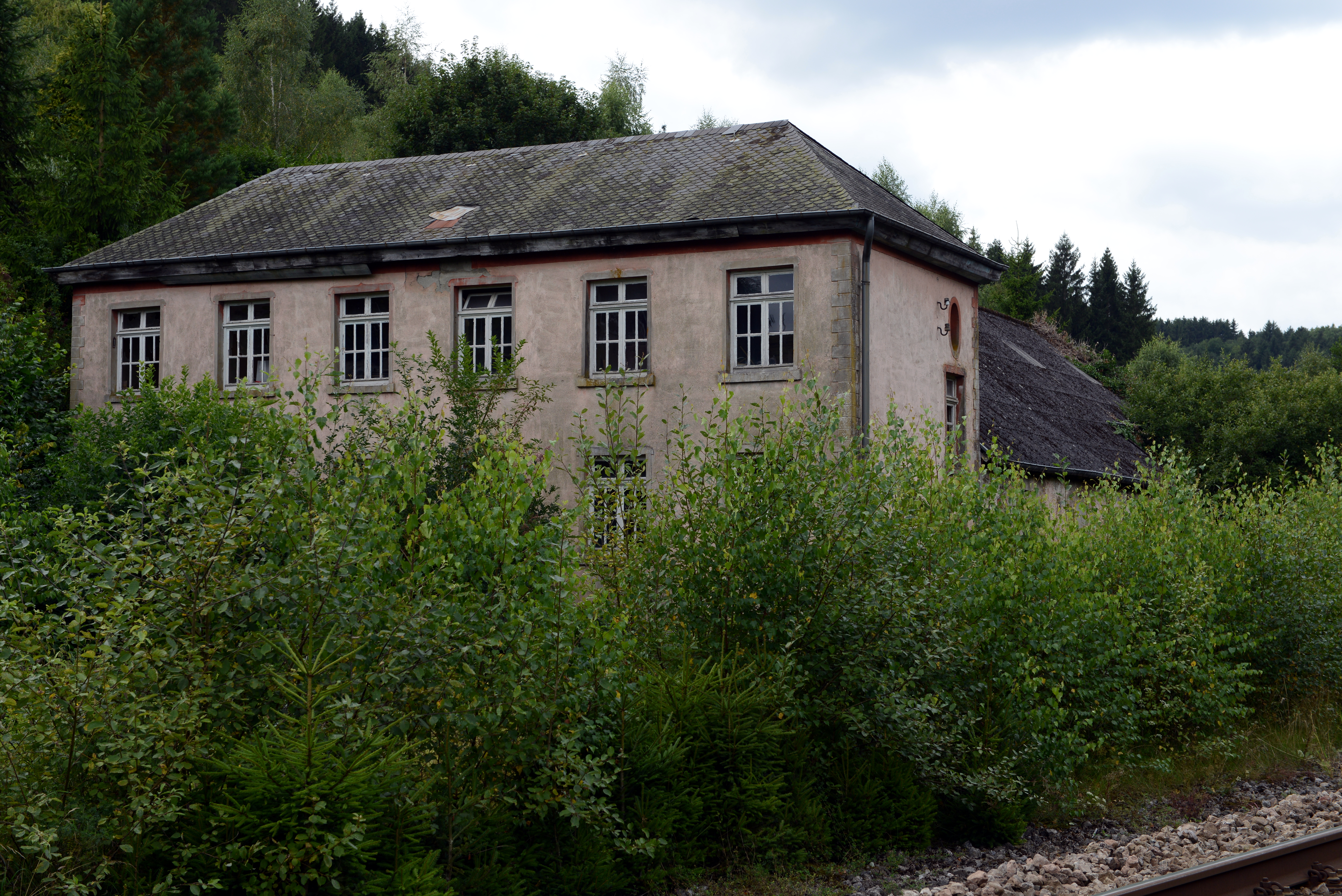 D'fréier Millen op der Pafemillen.